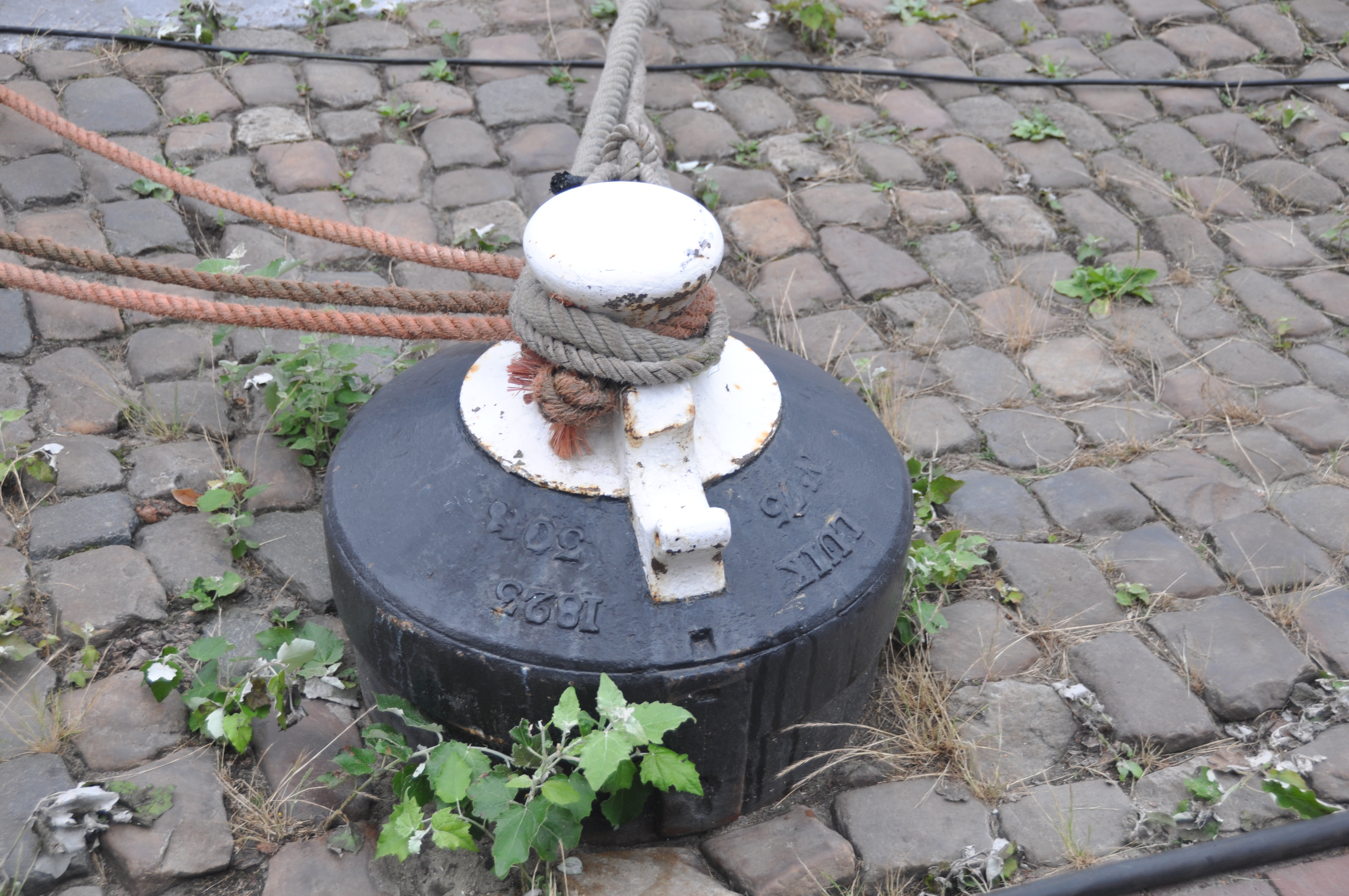 Scheepskanon in gebruik als bolder.